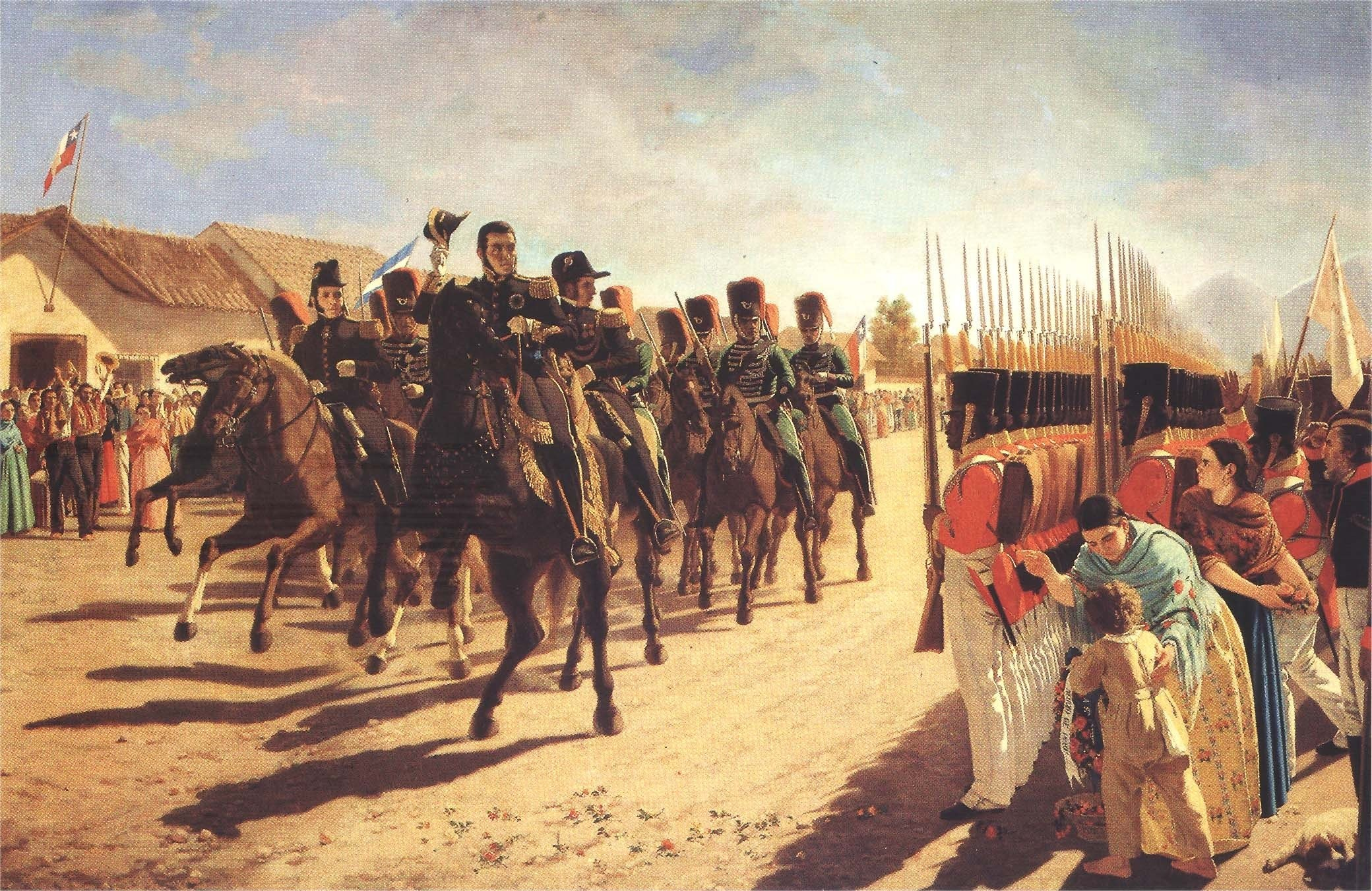 “Revista de Rancagua”, Óleo sobre tela en el Museo Histórico Nacional de Argentina.